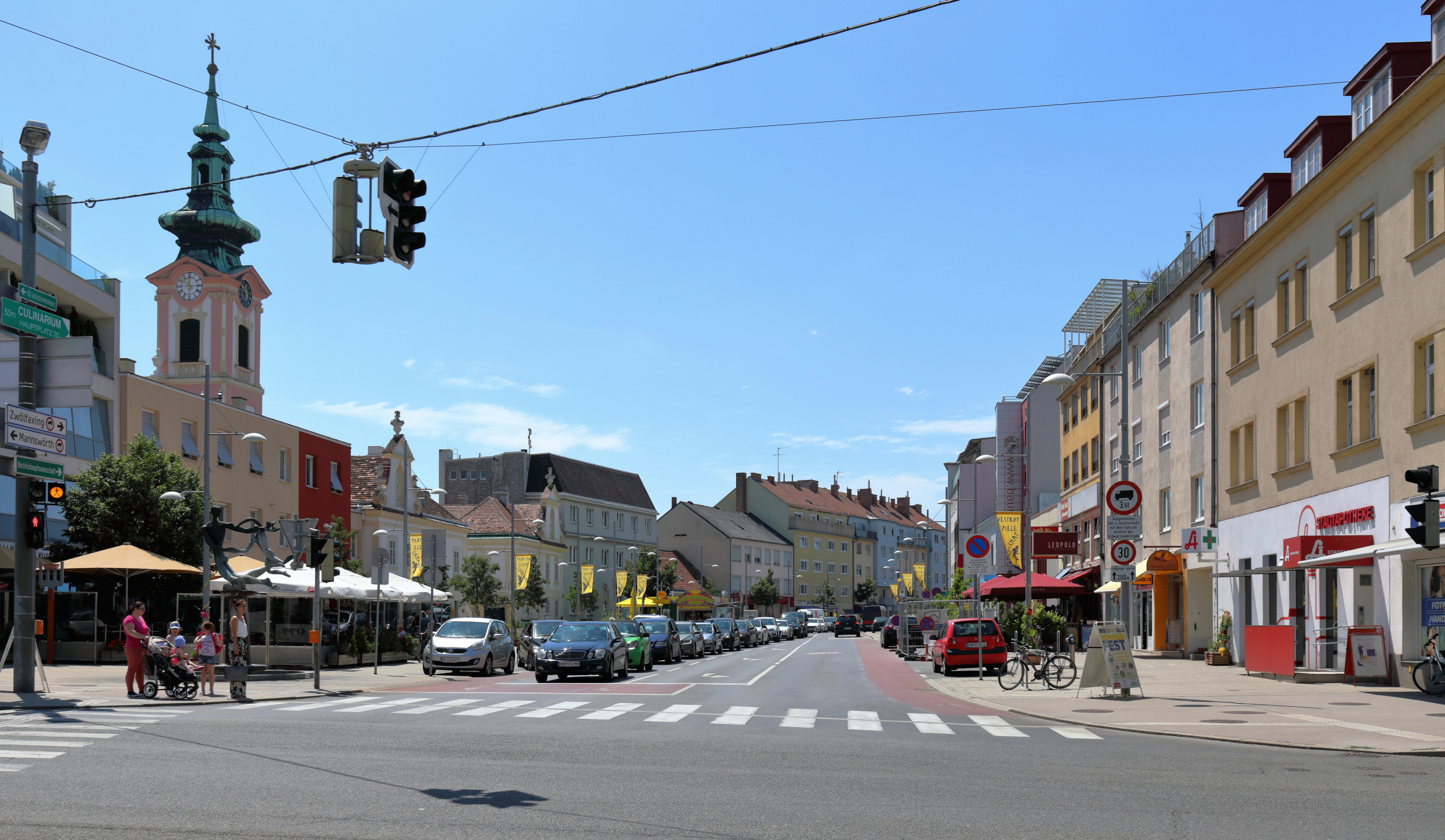 Nordansicht des Hauptplatzes der niederösterreichischen Stadt Schwechat.